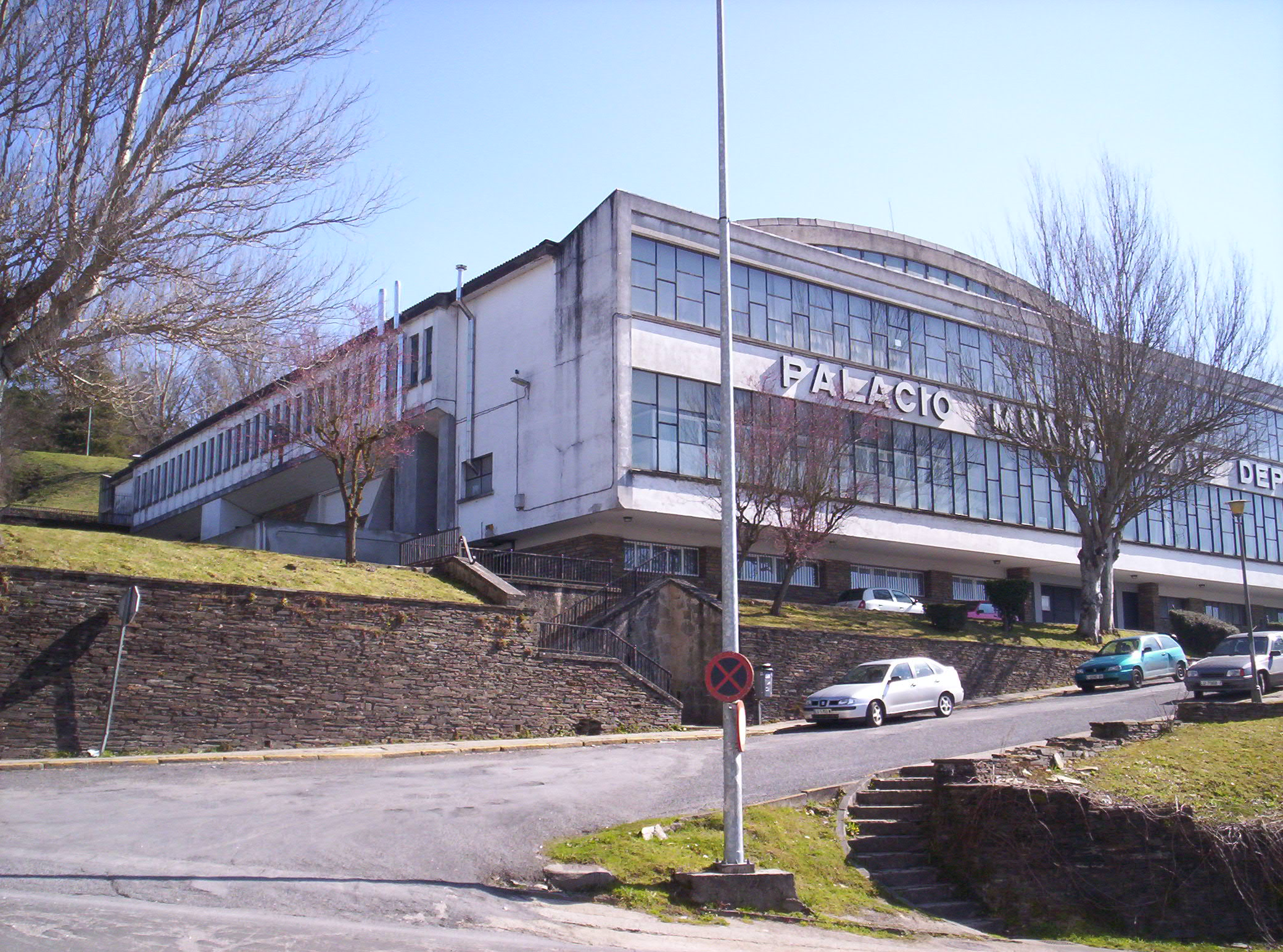 Palacio Municipal de deportes da cidade de Lugo.